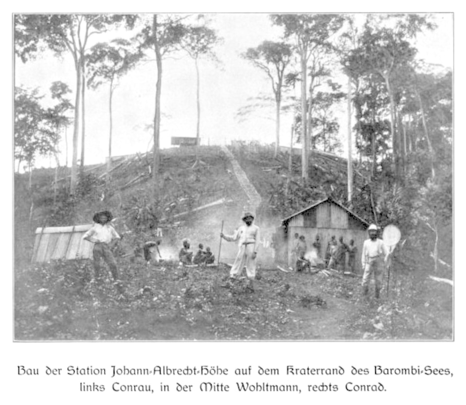 Bau der Station Johan-Albrecht-Höhe auf dem Kraterrand des Barombi-Sees